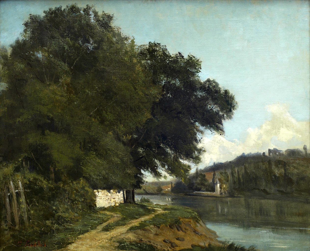 Hippolyte Pradelles (Strasbourg 1824-Bordeaux 1913), Paysage de la vallée du Peugue, huile sur toile, date ?, Musée des beaux-arts de Strasbourg